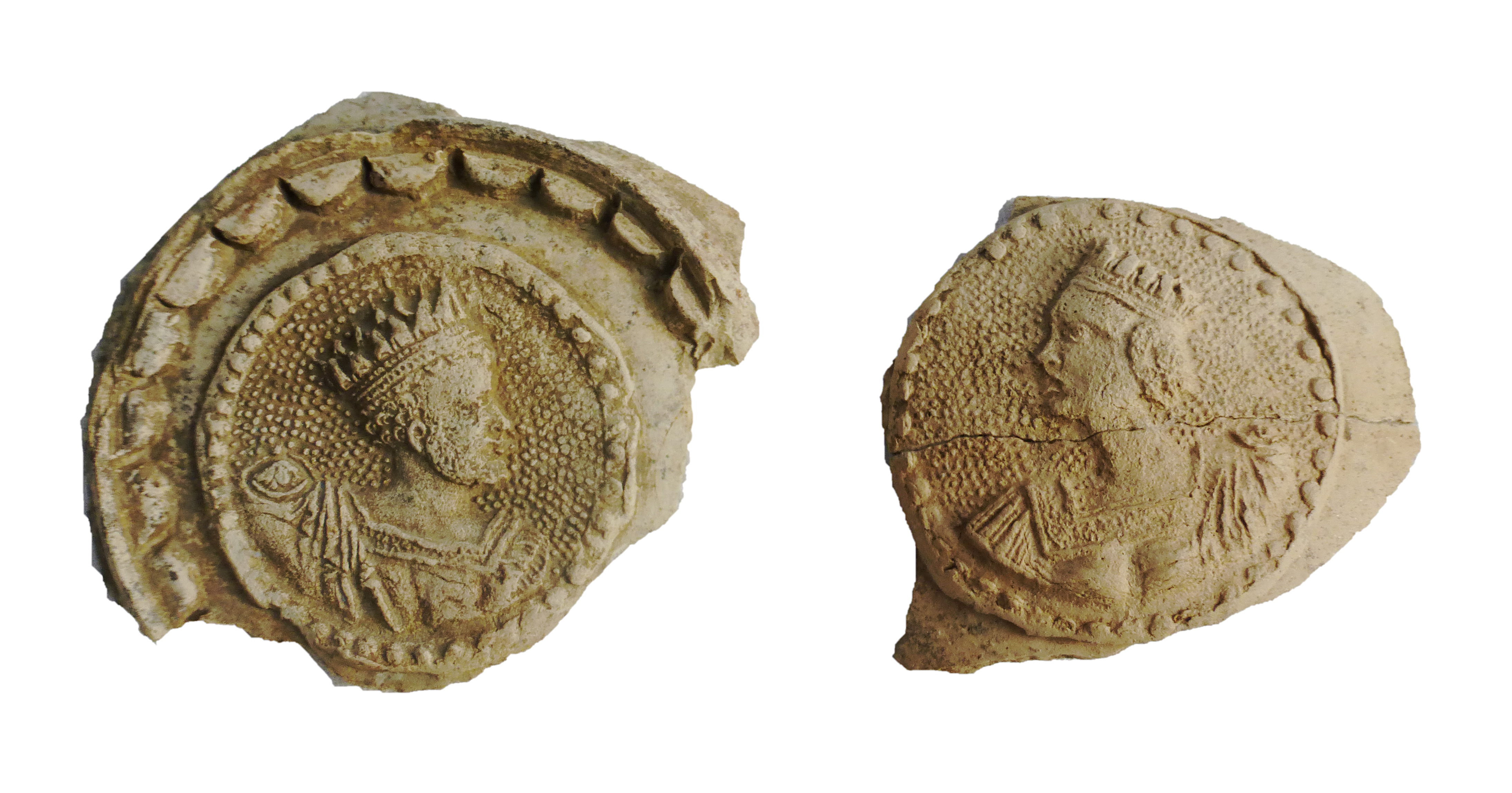 Tonscherben aus Gschaid mit Kaiser und Kaiserin